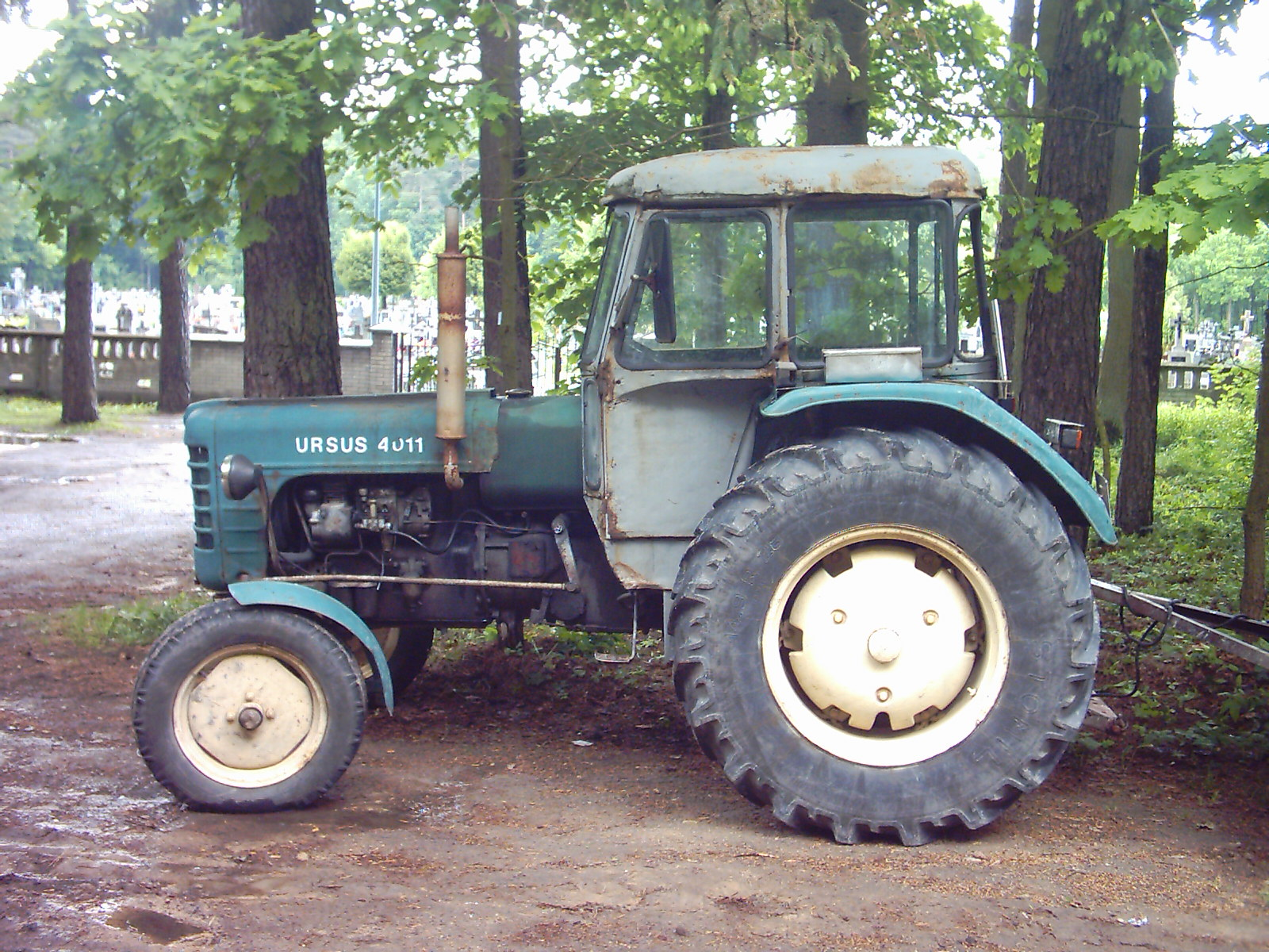 Ursus C-4011 (widok z boku)